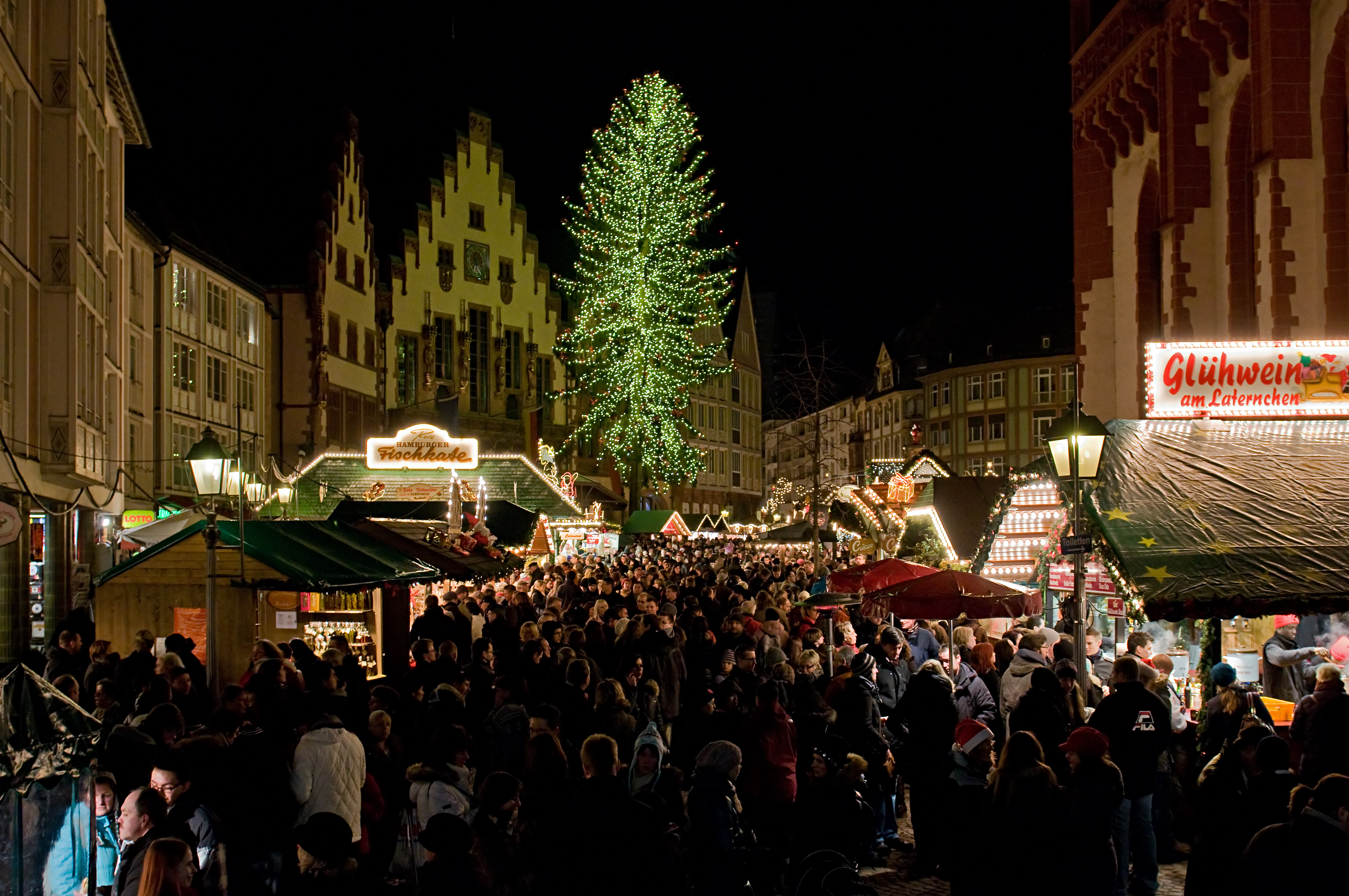 Impression vom Frankfurter Weihnachtsmarkt 2010